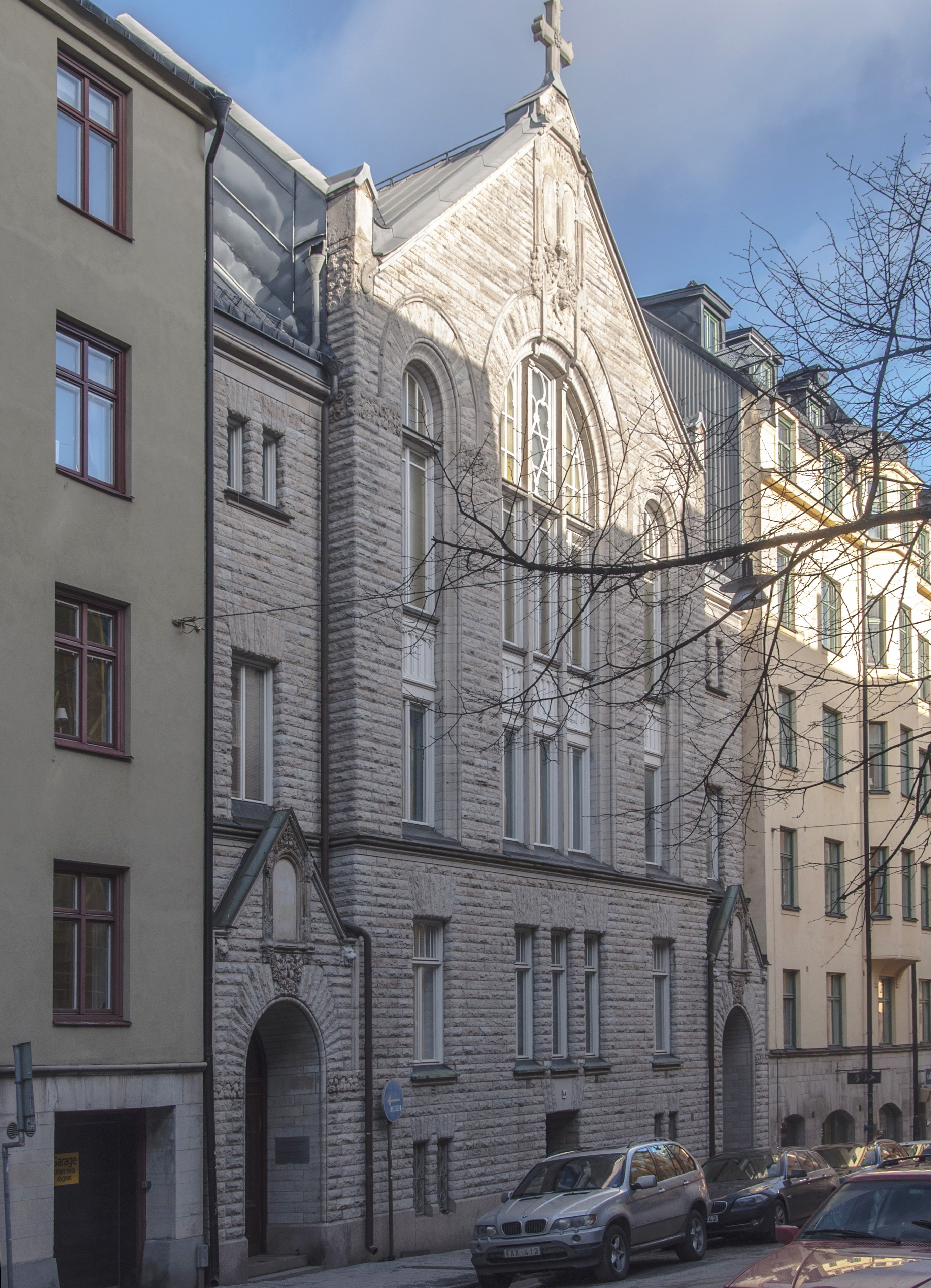 Messiaskapellet 2014, Idungatan 4, Nybyggnadsår 1906 - 1907, Dorph & Höög (Arkitekt) Emil Johansson (Byggmästare) Föreningen för Israels Mission (Byggherre)